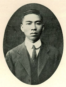 Bân-lâm-gú: Iûⁿ Liông